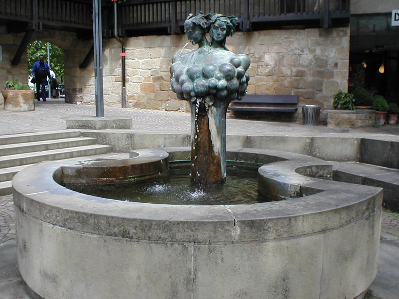 Weinbrunnen in Güglingen, entworfen von Ursula Stock